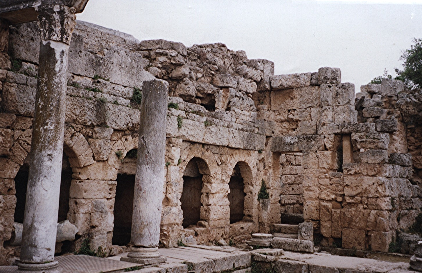 Fontaine Pirène «inférieure» à Corinthe. Photo personnelle prise par l'utilisateur Urban Urban, 2004